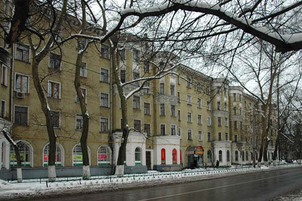 Москва, Саратовская улица, дом 18.